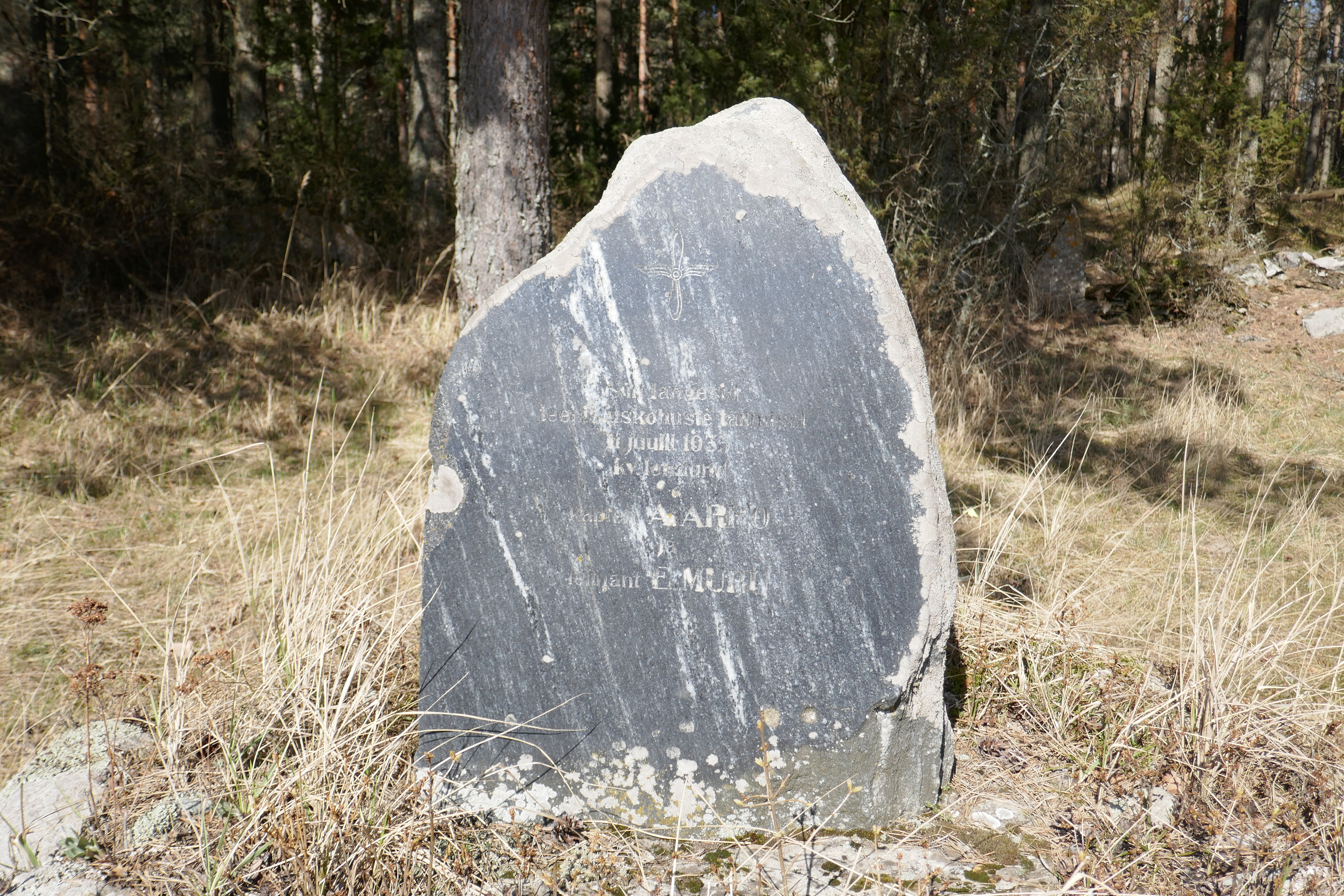 Mälestuskivi Valkla õppevälja lennuõnnetuses (1935) hukkunud lenduritele.